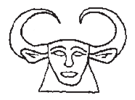 Kopf der Bat, siehe Narmer-Palette (engl. head of goddess Bat, as seen at the Narmer-palette